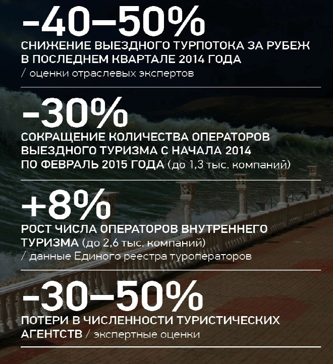 Состояние туристической отрасли в России, 2014-2015